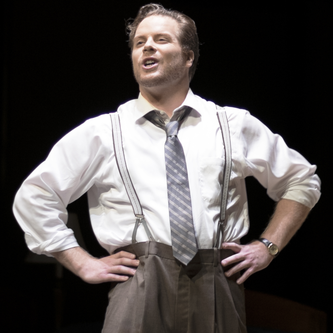 Éliot Laprise au théâtre de la Bordée en 2015